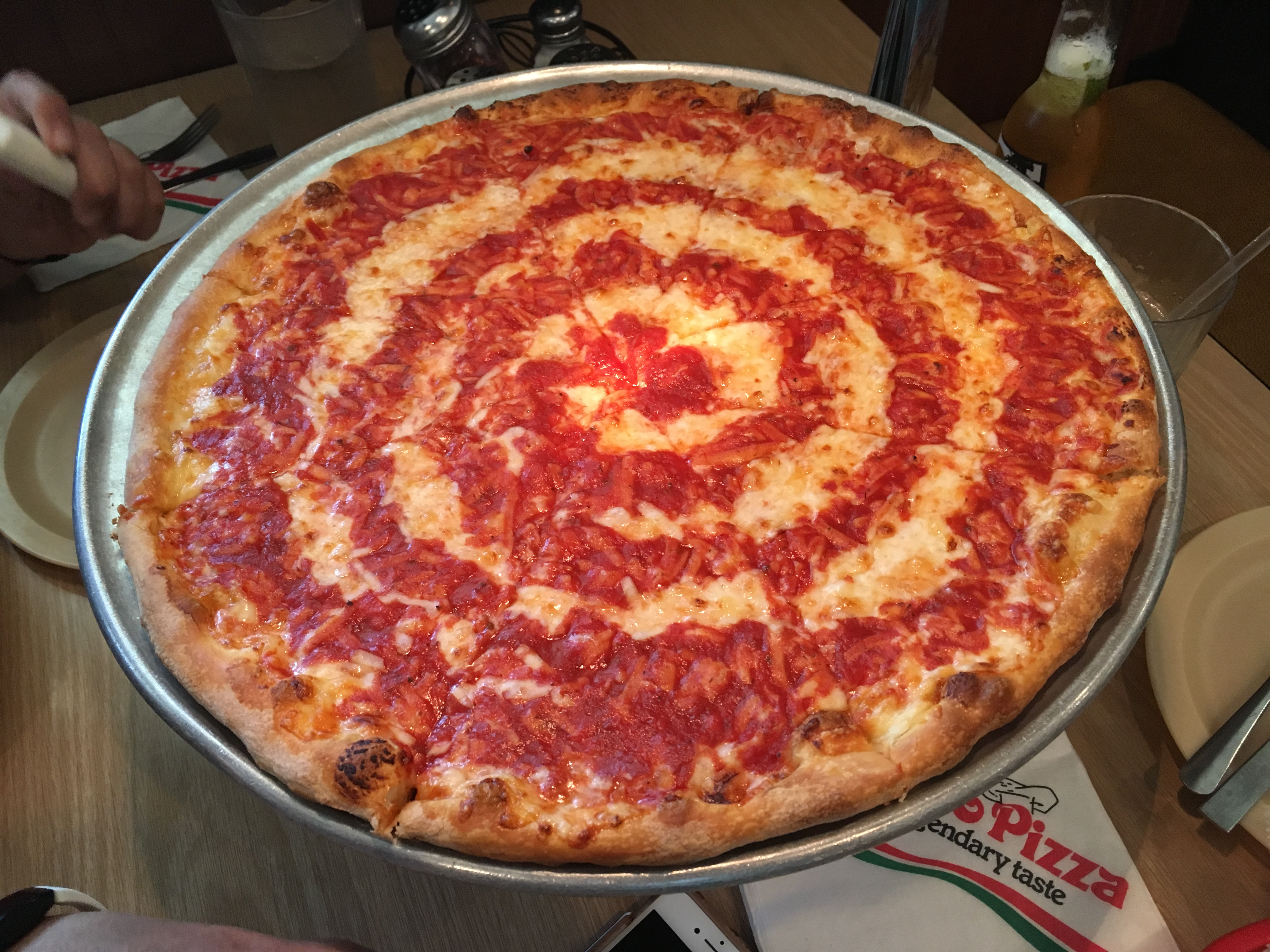 A pie of cheese pizza at the Grotto Pizza restaurant in Dover, Delaware